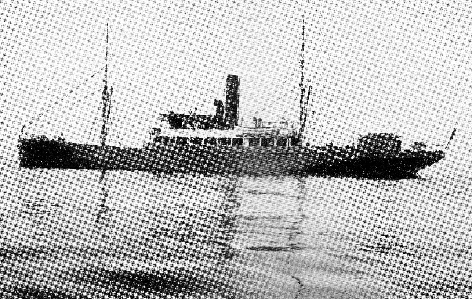 Hilfsschiff A der Kaiserlichen Marine als U-Bootfalle ALEXANDRA um 1916